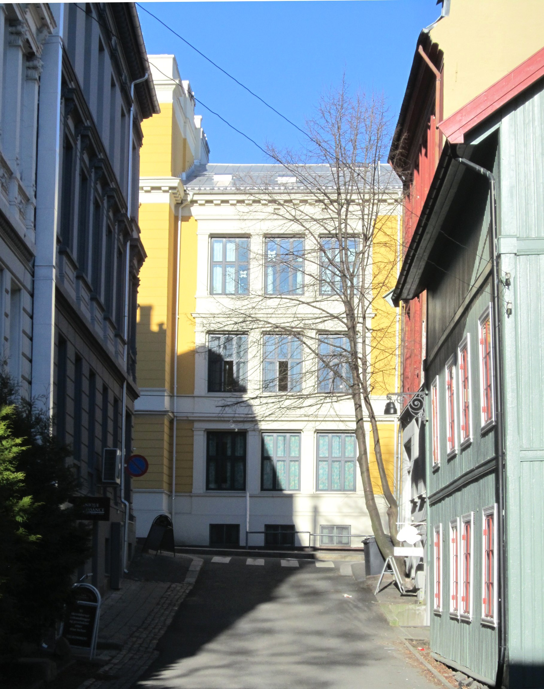 Lallakroken mot Briskebyveien